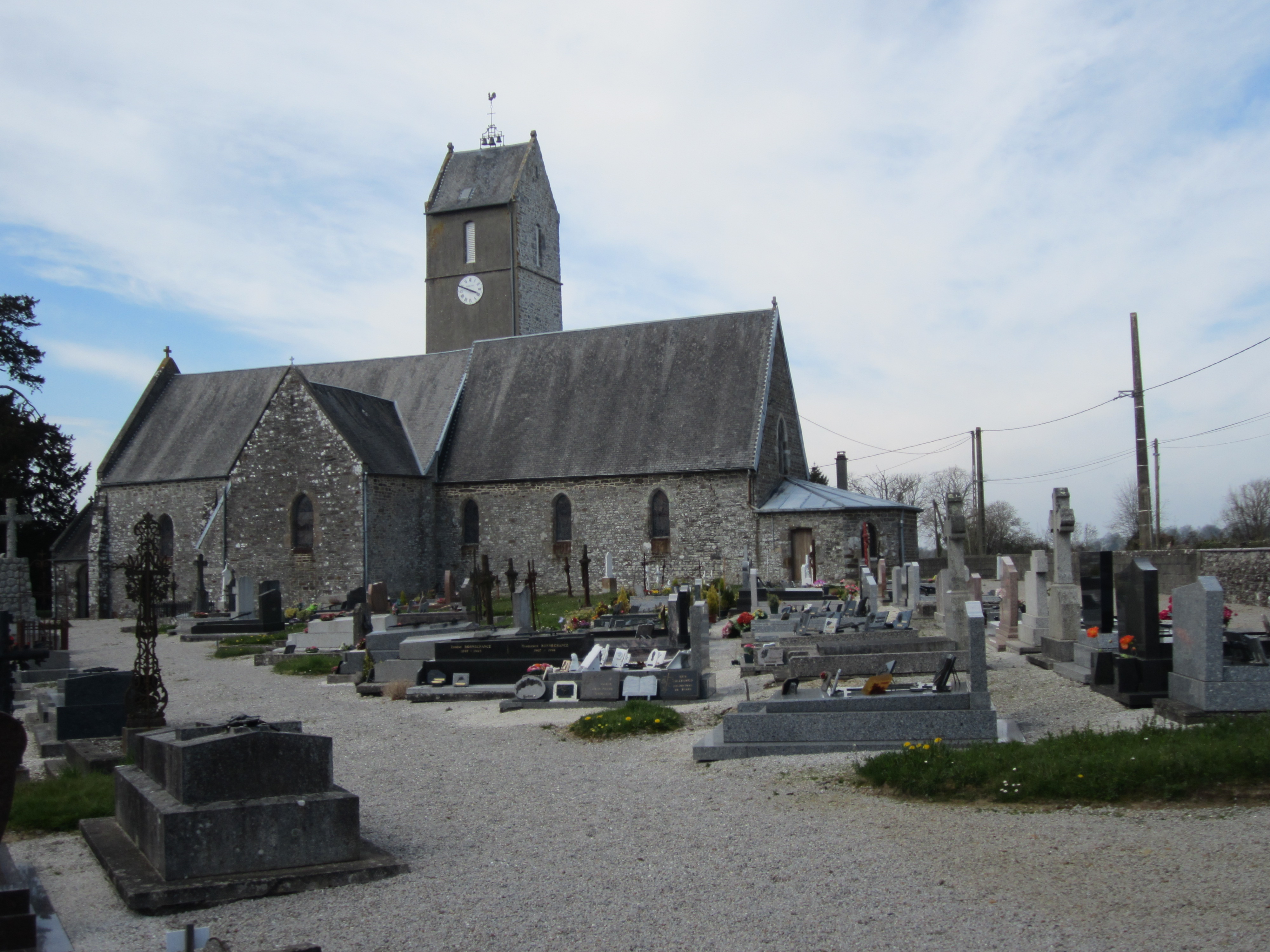 Le Mesnil-Rogues, MAnche